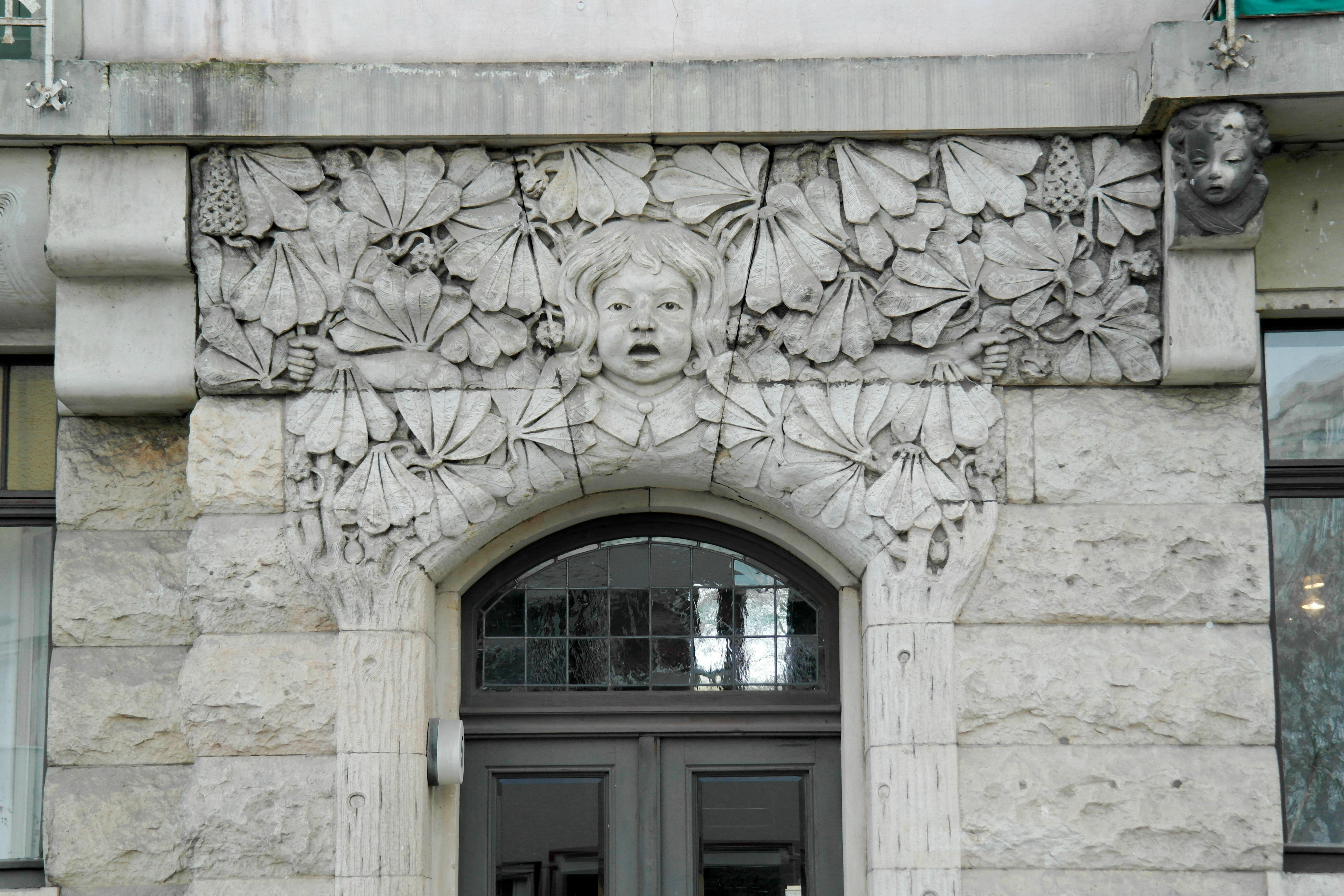 Dresden, Bundschuhstraße 5, Eingangsportal vom Dresdner Bildhauer Eduard Jungbluth - Detail.